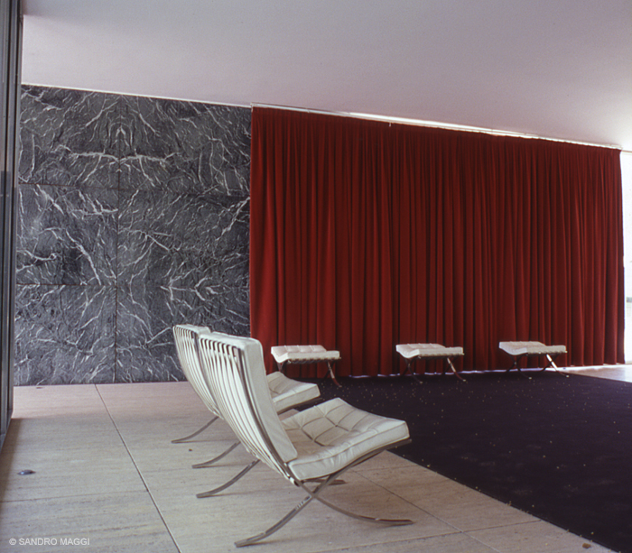 Pavelló alemany (Barcelona)